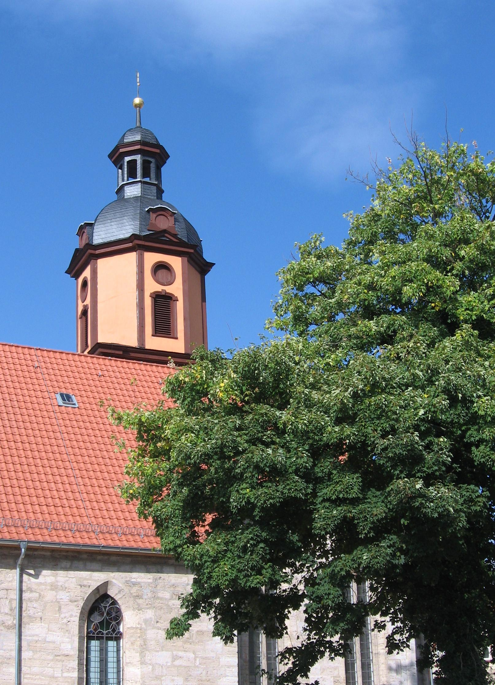 Sankt Kiliani, Domizil des 3K-Theaters und die davor stehende alte Linde.